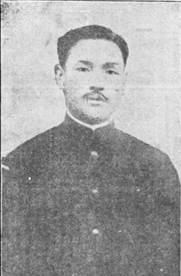 金始顯김시현